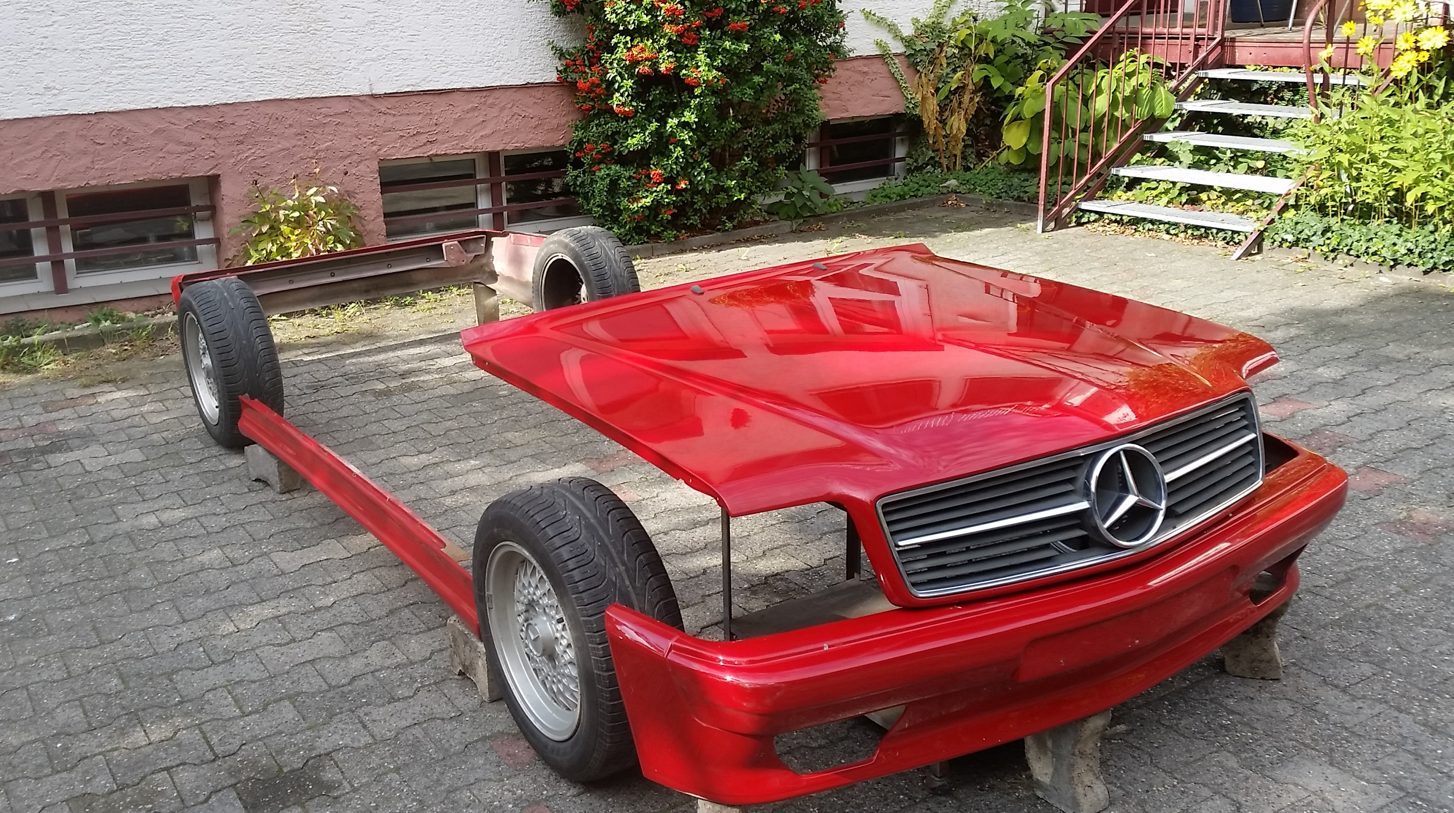 AKH-Haube und -Spoiler NOTEALPHA